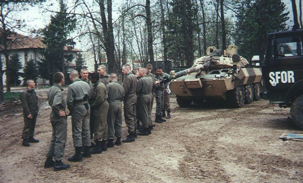 Nettoyage du canon d'un AMX 10 RC. Ce char est équipé de surblindages latéraux et de caisses métalliques contenant des briques d'eau potable. L'effort conjugué de nombreuses personnes est nécessaire pour tirer la hampe sur laquelle est monté un écouvillon. Photo prise en 1997 Rajlovac, Sarajevo, lors d'une mission SFOR du 3ème Régiment de Hussards. Crédit : Samuel GAZÉ Licensing Category:1997 Category:armée française